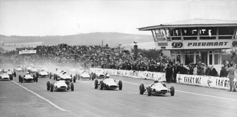 20.8.1962 Motorrad-Weltmeisterschaftsläufe auf dem Sachsenring Auf dem berühmten Sachsenringkurs bei Hohenstein-Ernstthal wurden am 18.-19.8.1962 die Motorrad-Weltmeisterschaftsläufe um den "Großen Preis der Deutschen Demokratischen Republik" ausgetragen. UBz: Start zum "Paul-Greifzu-Gedächtnislauf" der Rennwagen Formel Junior 1100 ccm."